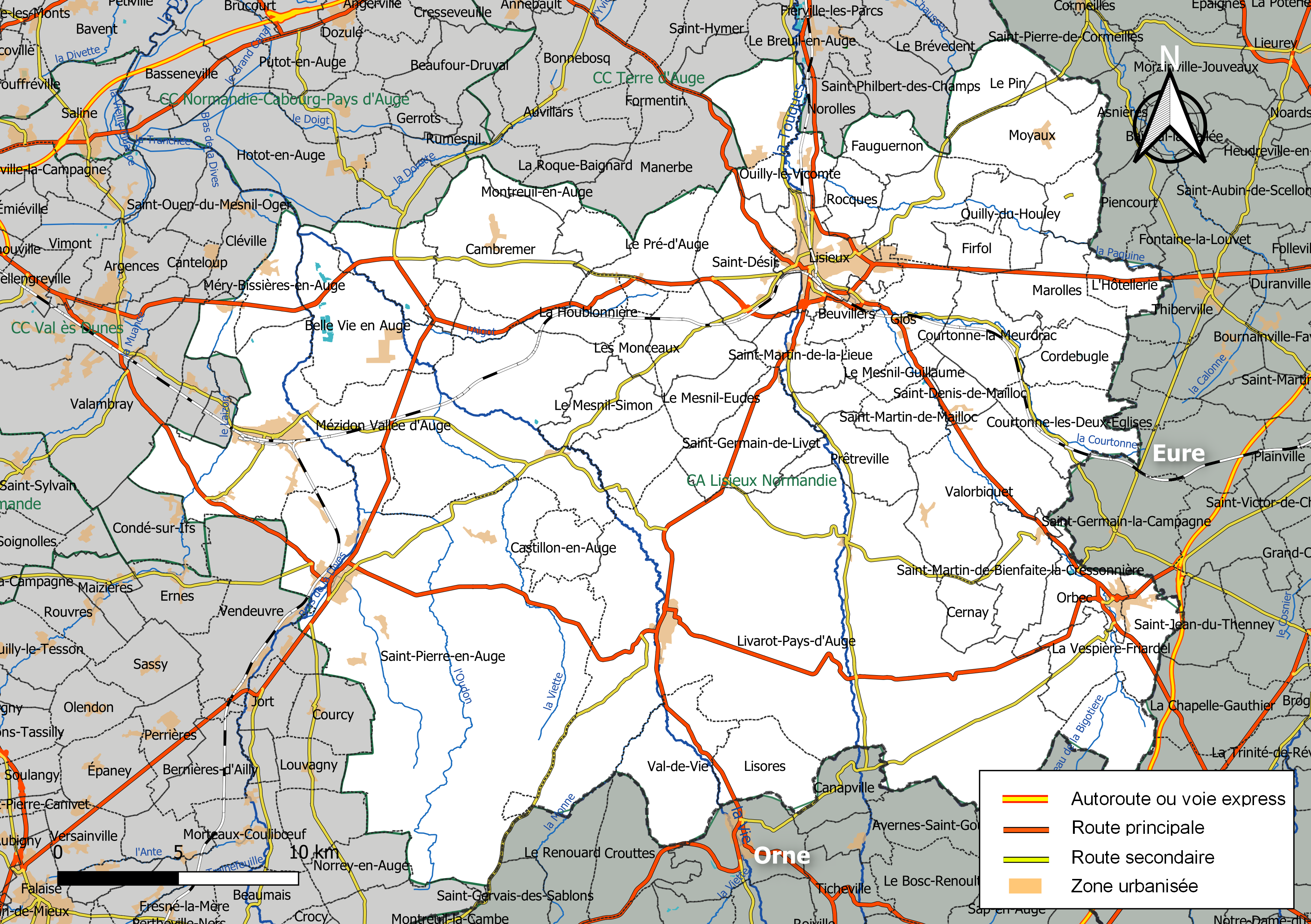 Carte géographique de la Communauté d'agglomération Lisieux Normandie, département du Calvados, France. Composition au 1er janvier 2019.